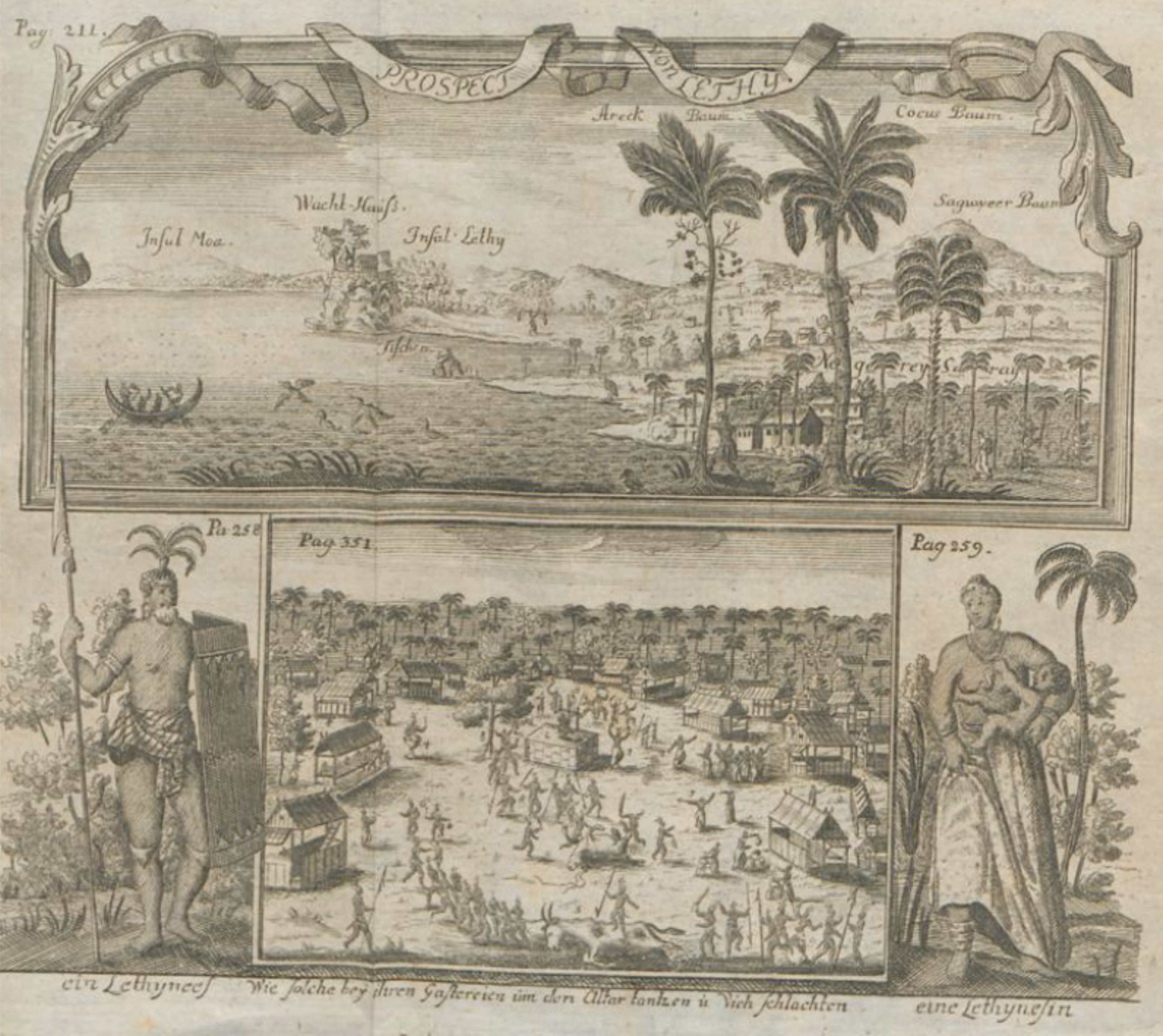 Prospekt von Leti. Unten links: Letinese, rechts: Letinesin, mitte: Dorfbevölkerung bei traditioneller Feier